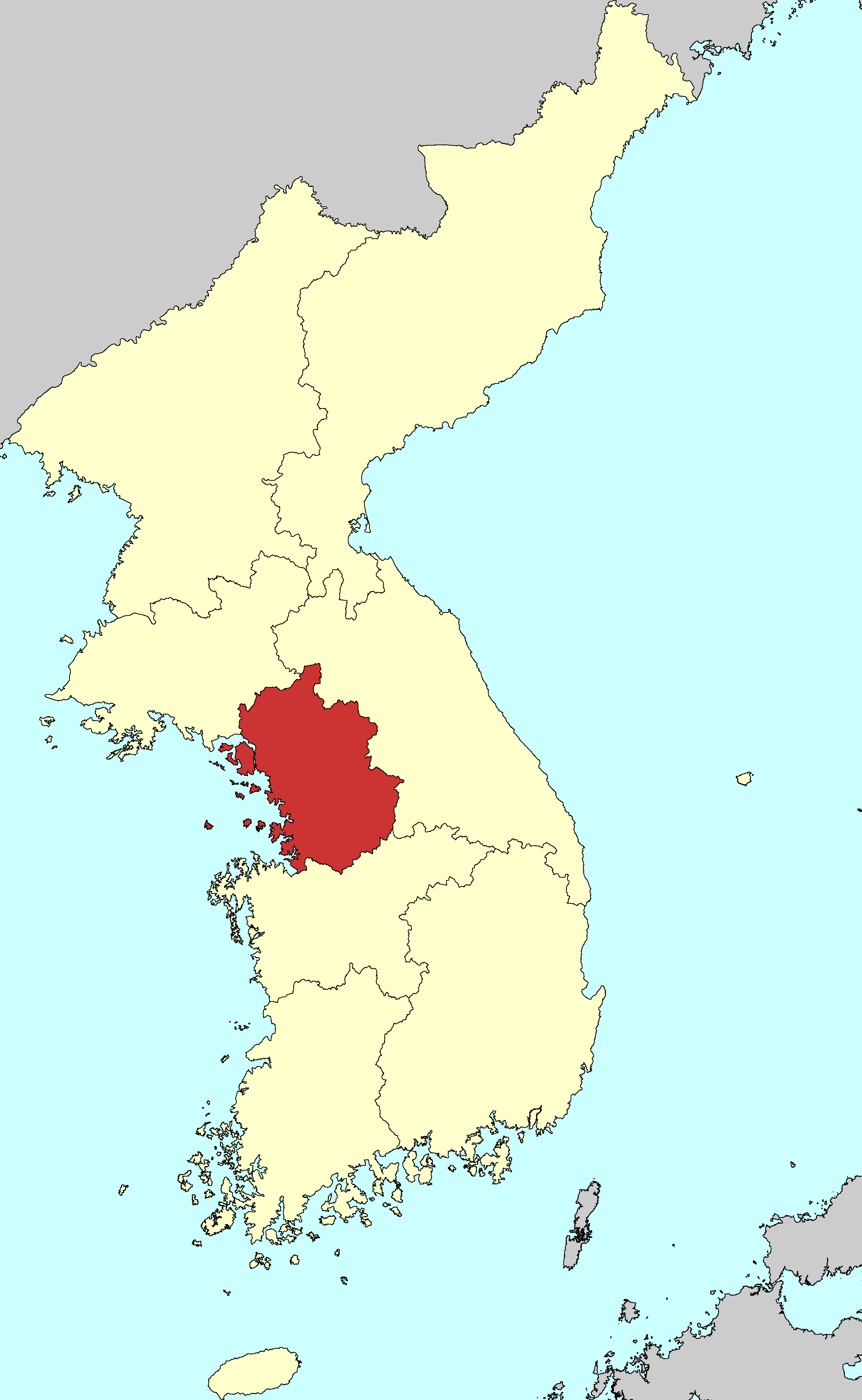 조선후기 경기도